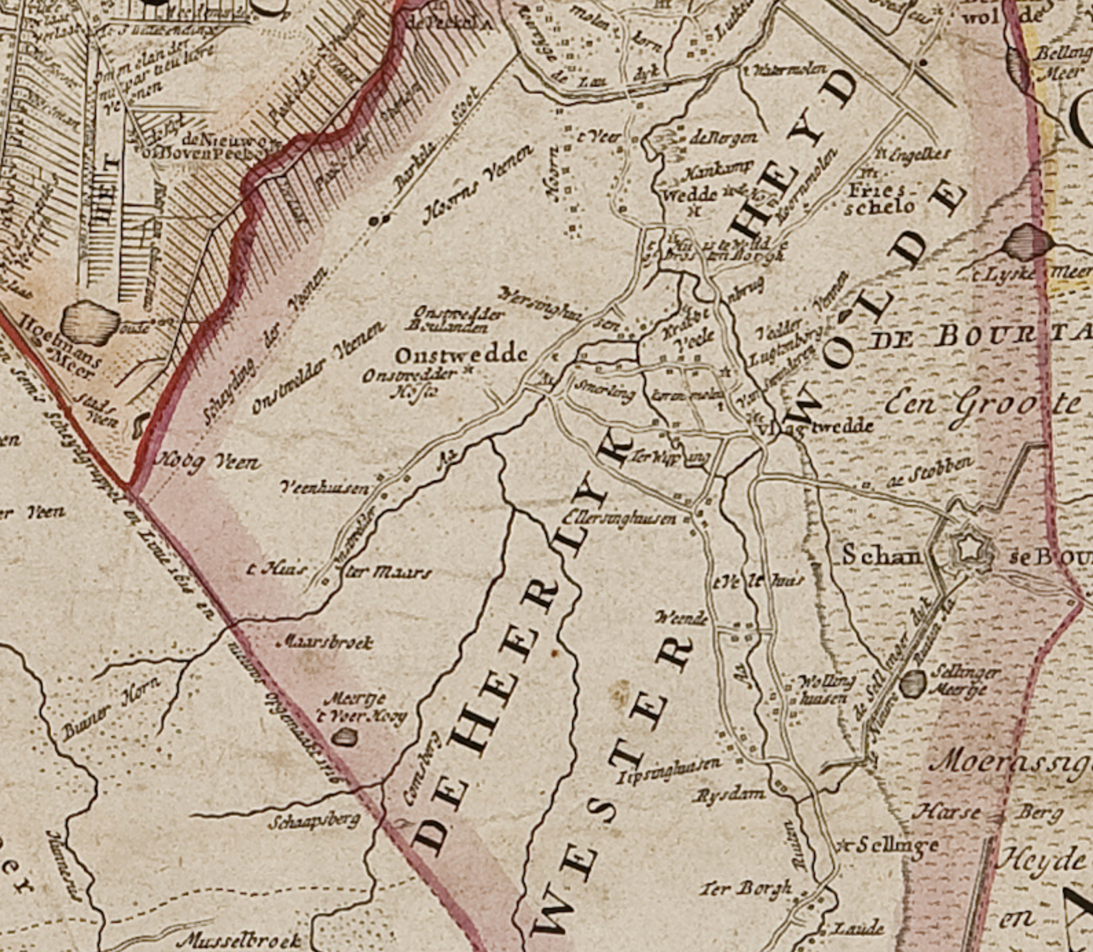 Detail van een kaart van Groningen - omgeving Onstwedde voor de ontginning van het veengebied rond Stadskanaal